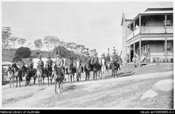 William Henry Corkhill 1846-1936 Tilba Tilba NSW 1900-1929 Photographs held in Pictures Collection National Library of Australia The owner of this work is the National Library of Australia which allows anyone to use it for any purpose on condition that attribution is made to the artist/creator, description is included and owning institution acknowledged. Redistribution, derivative work, commercial use and all other uses is permitted on these conditions